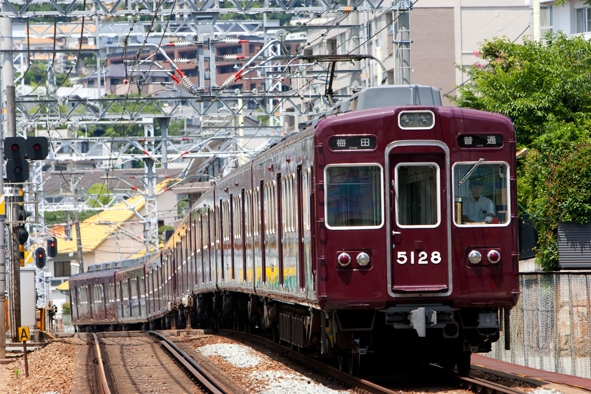 阪急5100系電車 川西能勢口 - 雲雀丘花屋敷